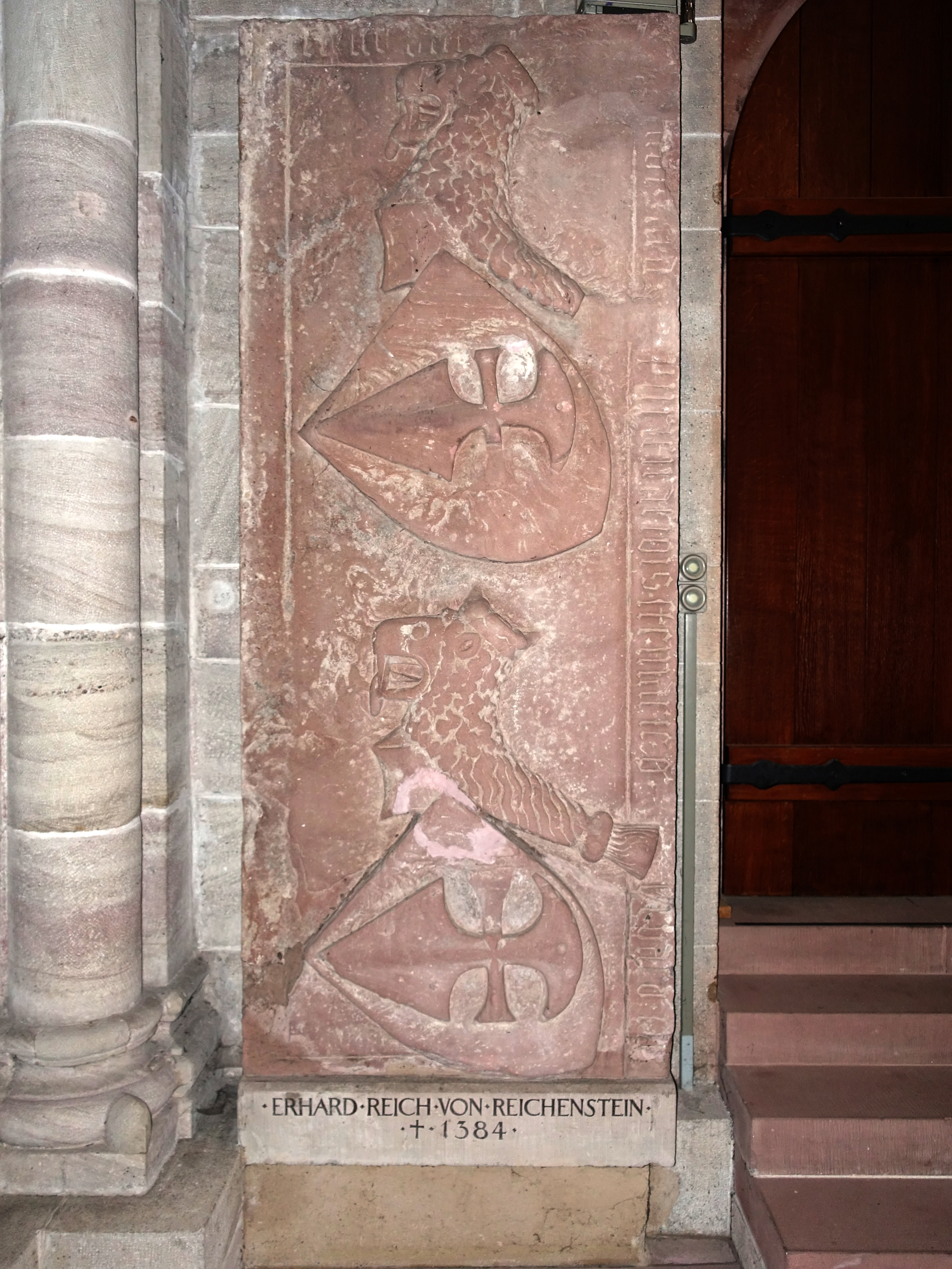 Erhard Reich von Reichenstein (gestorben 1384) Epitaph im Basler Münster